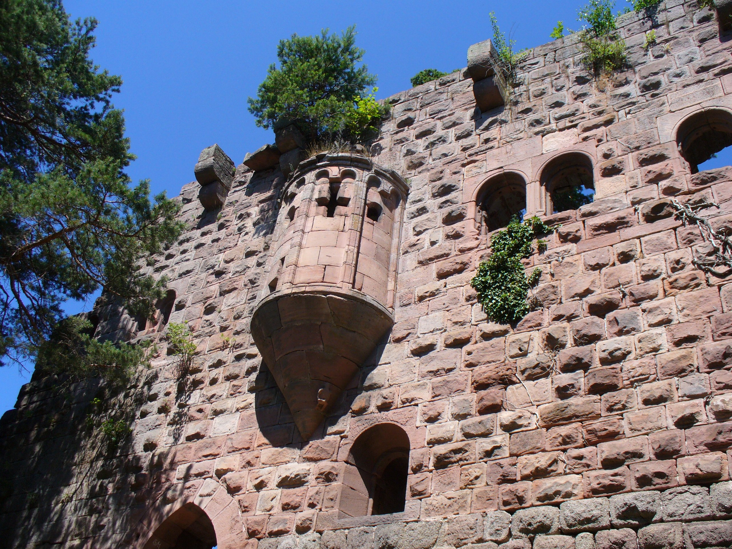 Summary Bildbeschreibung: Burg Landesberg im Elsass, Kapellenerker am Palas Quelle: eigene Fotografie Fotograf/Zeichner: Thorsten Schlachter Datum: 02.07.2006